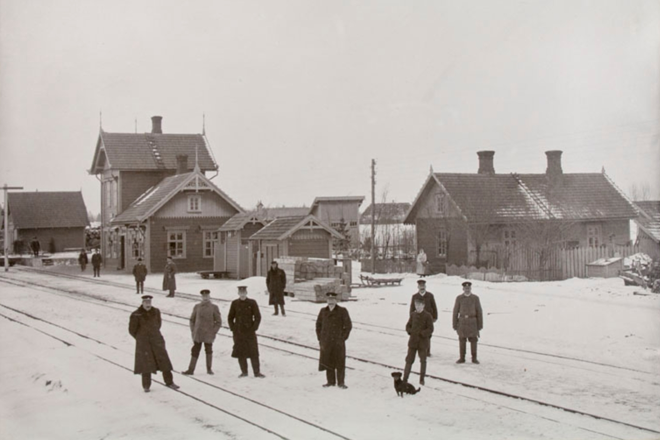 Pikksaare jaam 20. sajandi alguses